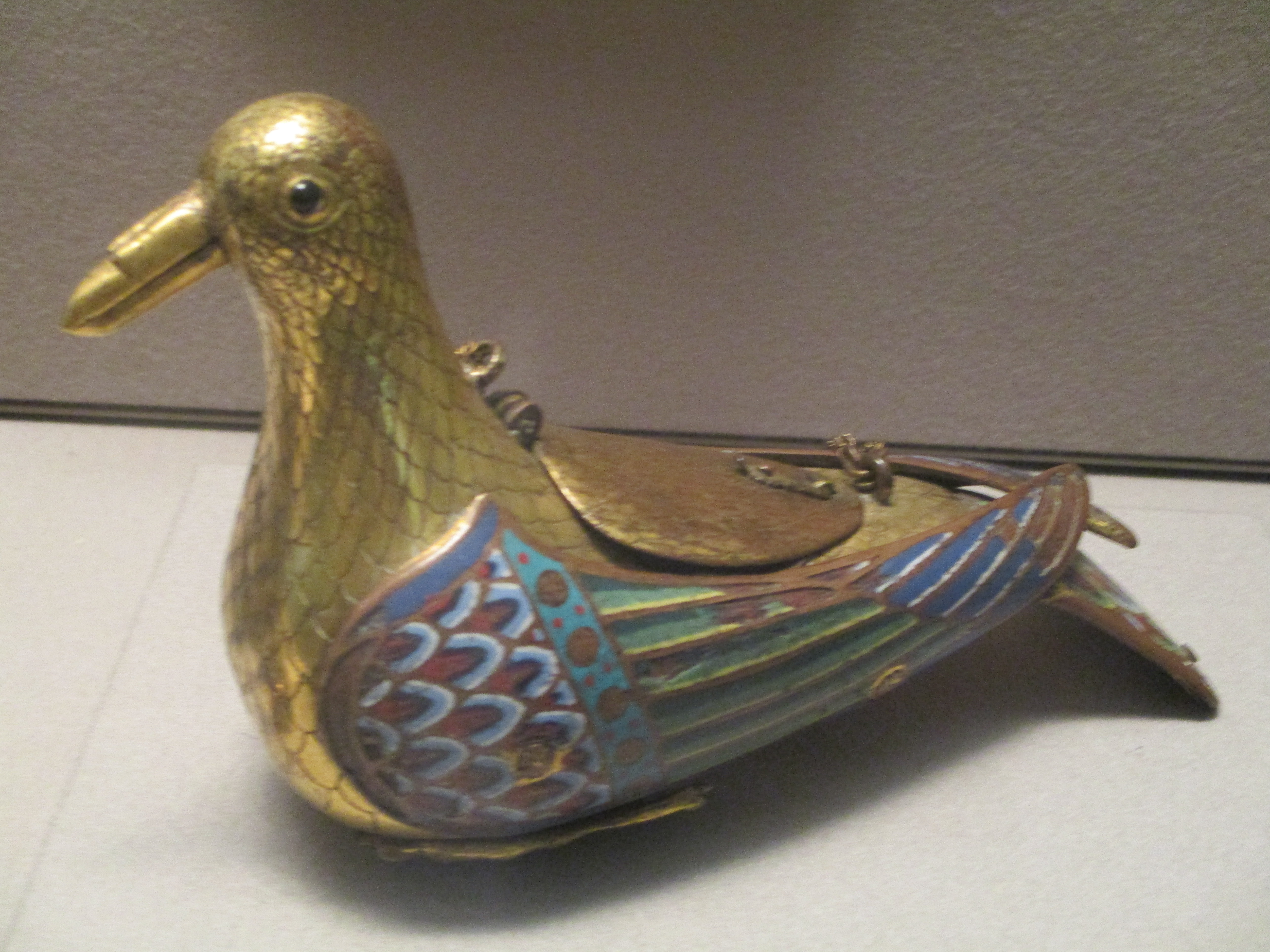 Colombe eucharistique, Limoges, première moitié du XIIIe siècle, émail champlevé sur cuivre doré. Don Victor Martin Le Roy au musée du Louvre en 1914. N° inv. OA 8104.